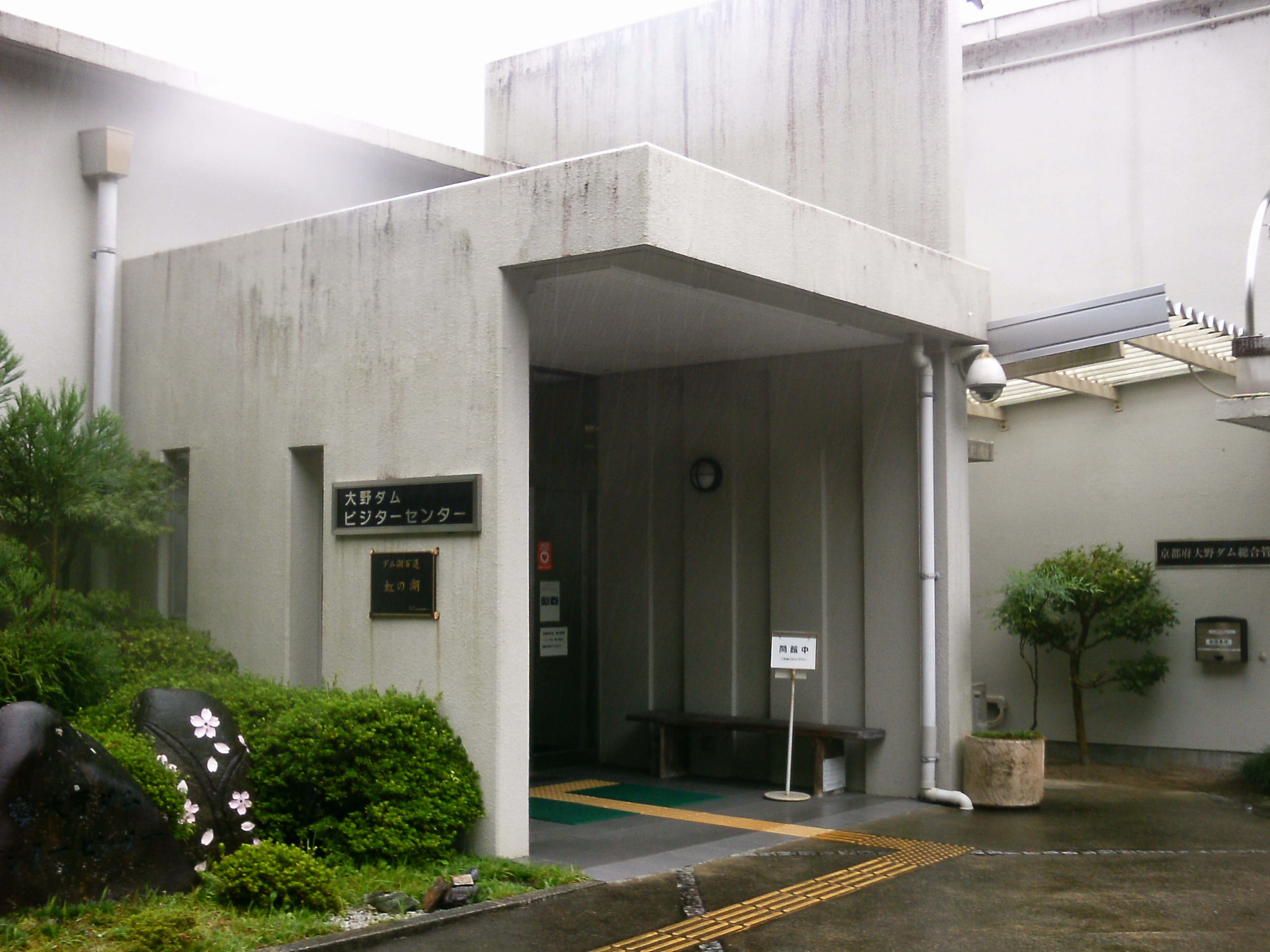 由良川の大野ダム（虹の湖）のビジターセンター